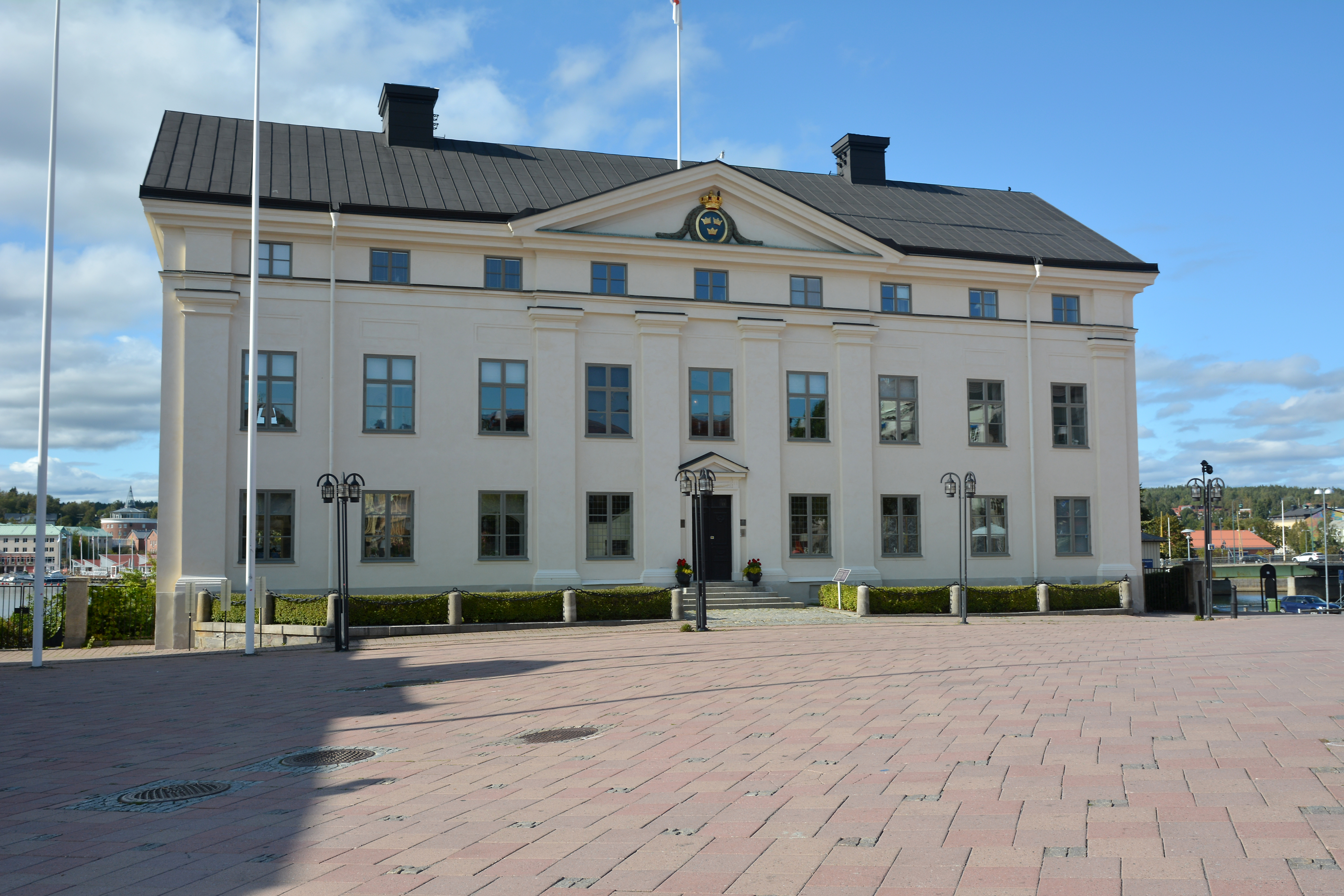 Residenset efter renoveringen 2017, foto 8 september 2019